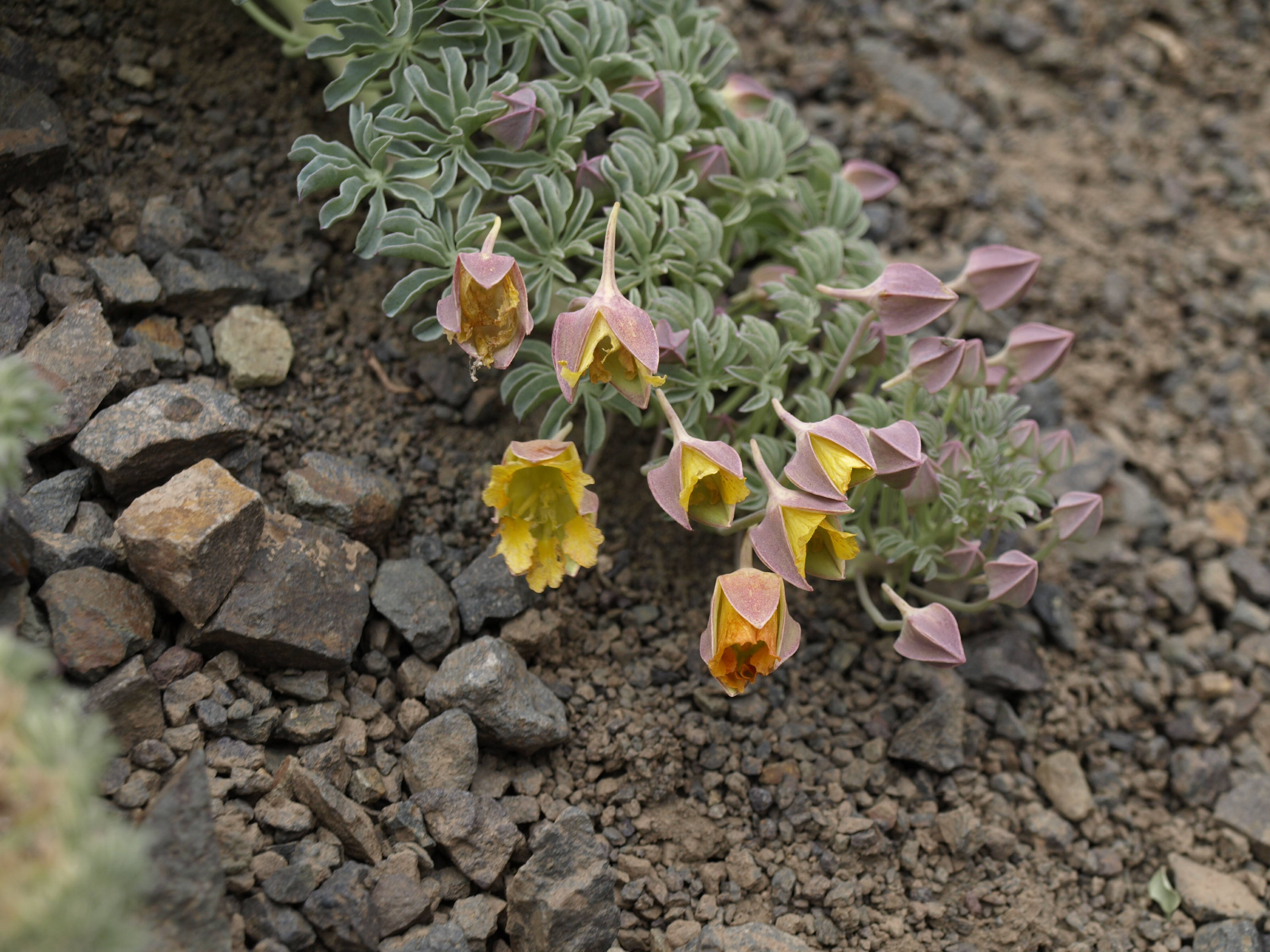 Embalse de Yeso, Chile.